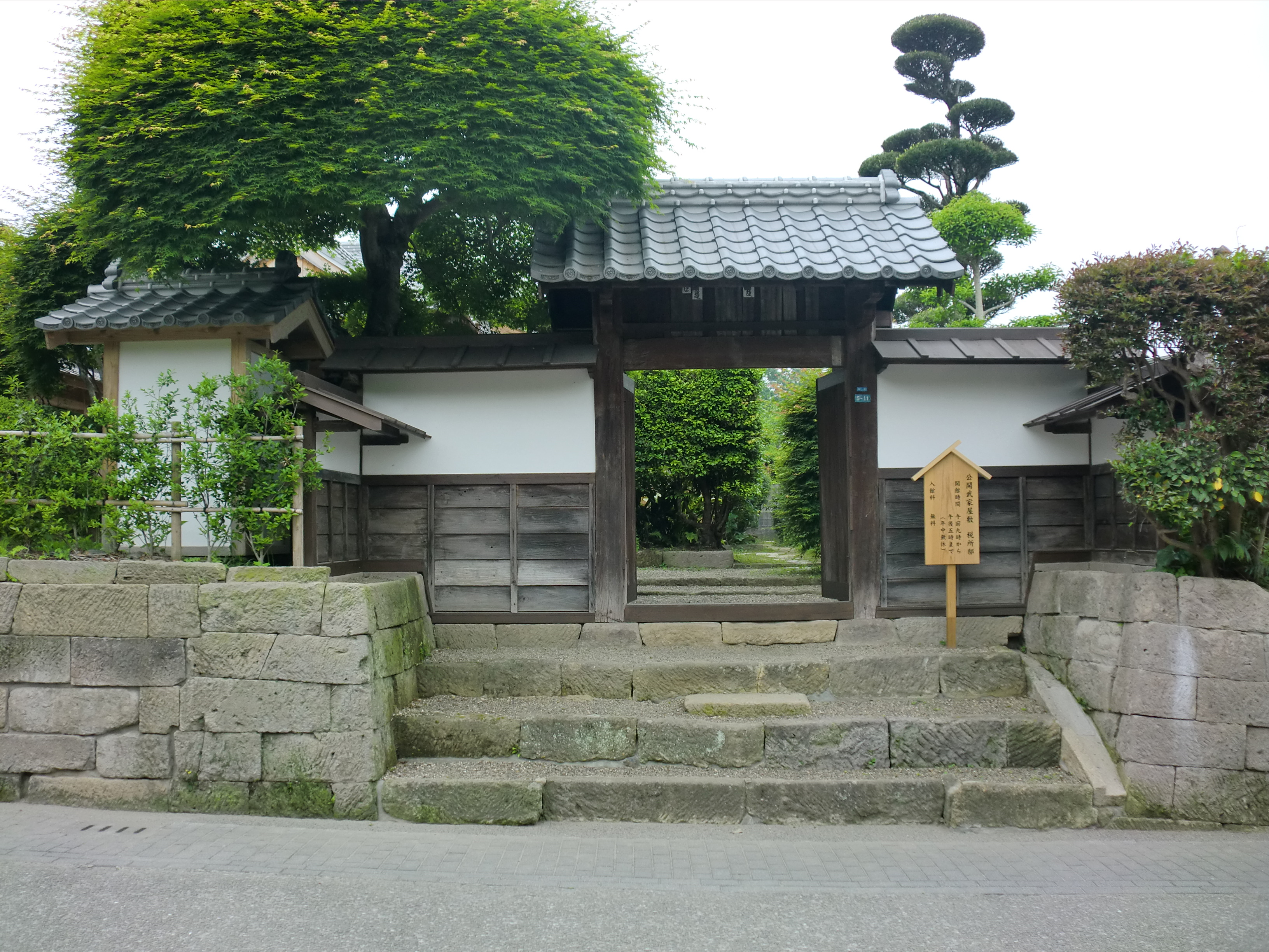 鹿児島県出水市にある税所（さいしょ）邸正門